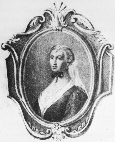 Беларуская (тарашкевіца): Ганна Сьвятаслаўна, жонка Вітаўта